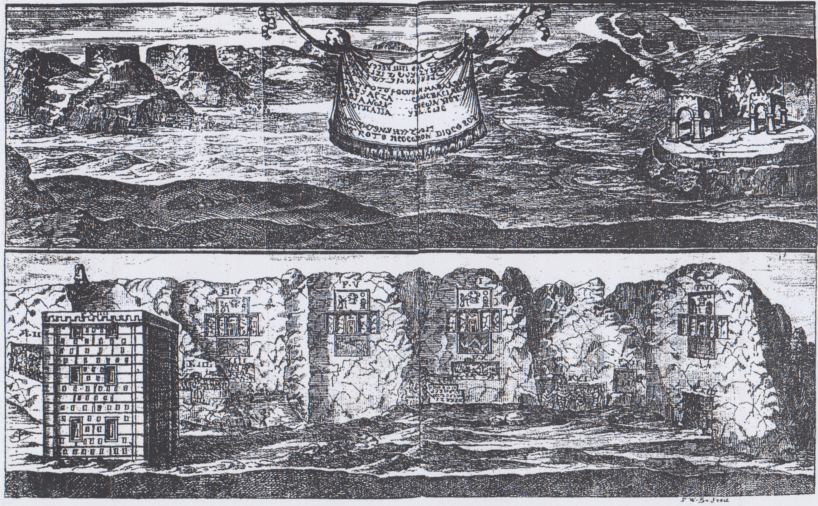 گراوور مسی منظره نقش رستم (A. E. P. 307)